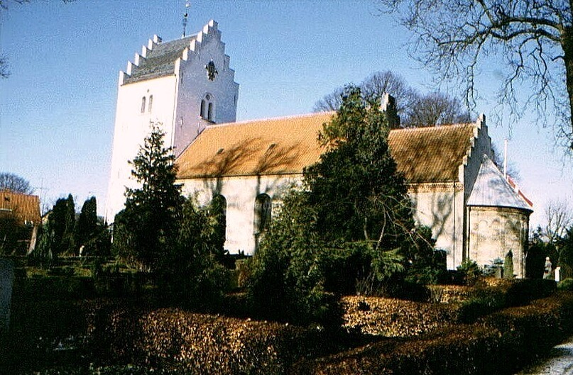 Skibby Kirke i Danmark. Skibby kirke